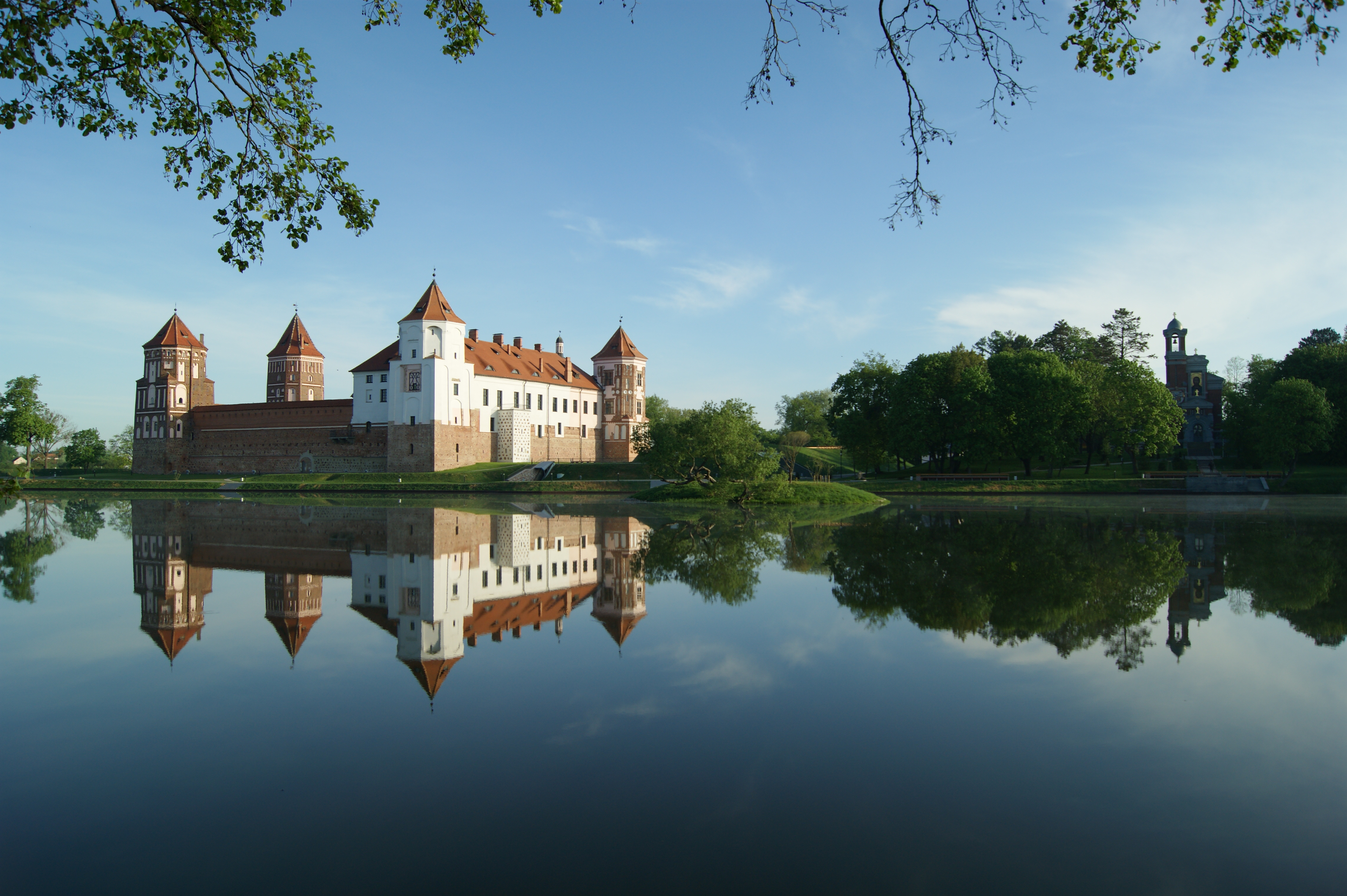 Беларуская (тарашкевіца): Замкавы комплекс «Мір». Будынкі, збудаваньні, пляніровачная структура, ляндшафтныя кампазыцыі, рэшткі земляных абарончых збудаваньняў, элемэнты абвадненьня. г.п. Мір